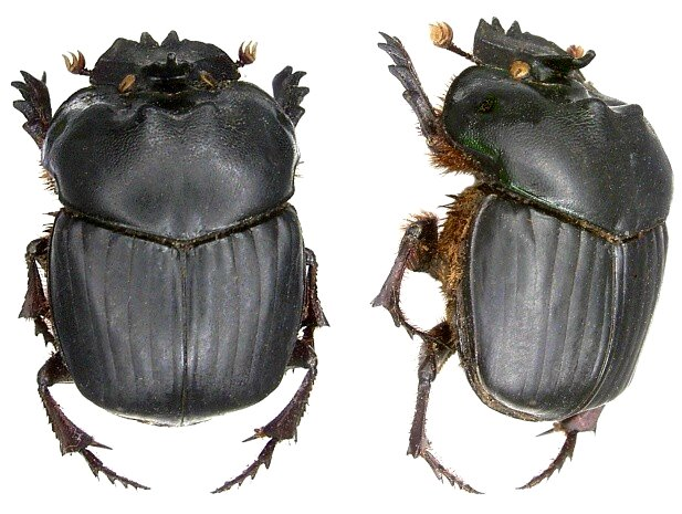 Familie: Scarabaeidae Groesse: 24-28 mm Verbreitung: Costa Rica, Guatemale, Mexiko, Nicaragua, Panama Fundort: Mexiko, Chiapas, 1981 Photo: U.Schmidt, 2006